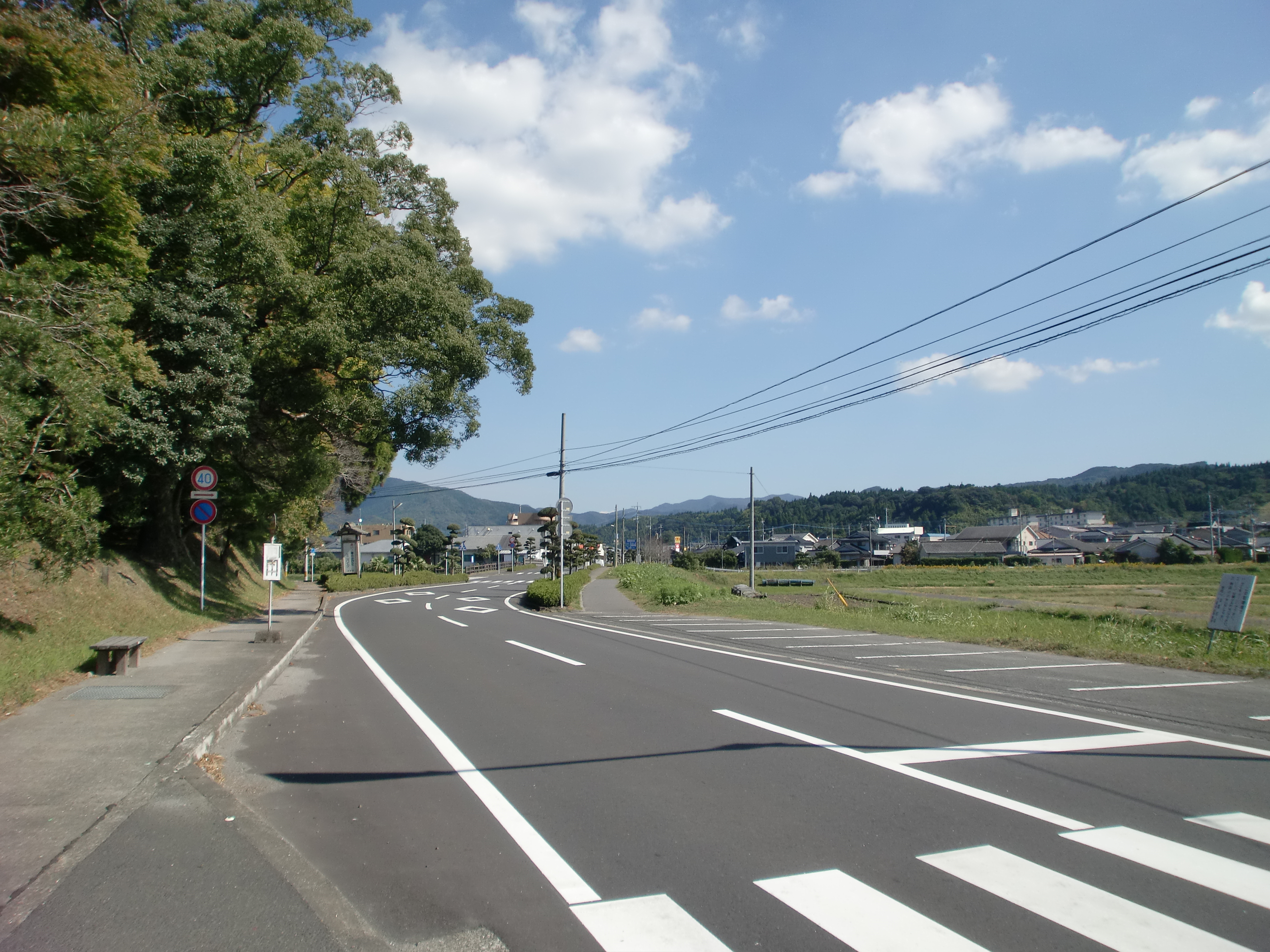 鹿児島県道27号頴娃川辺線を南九州市知覧町郡の豊玉姫神社前から頴娃方面に望む